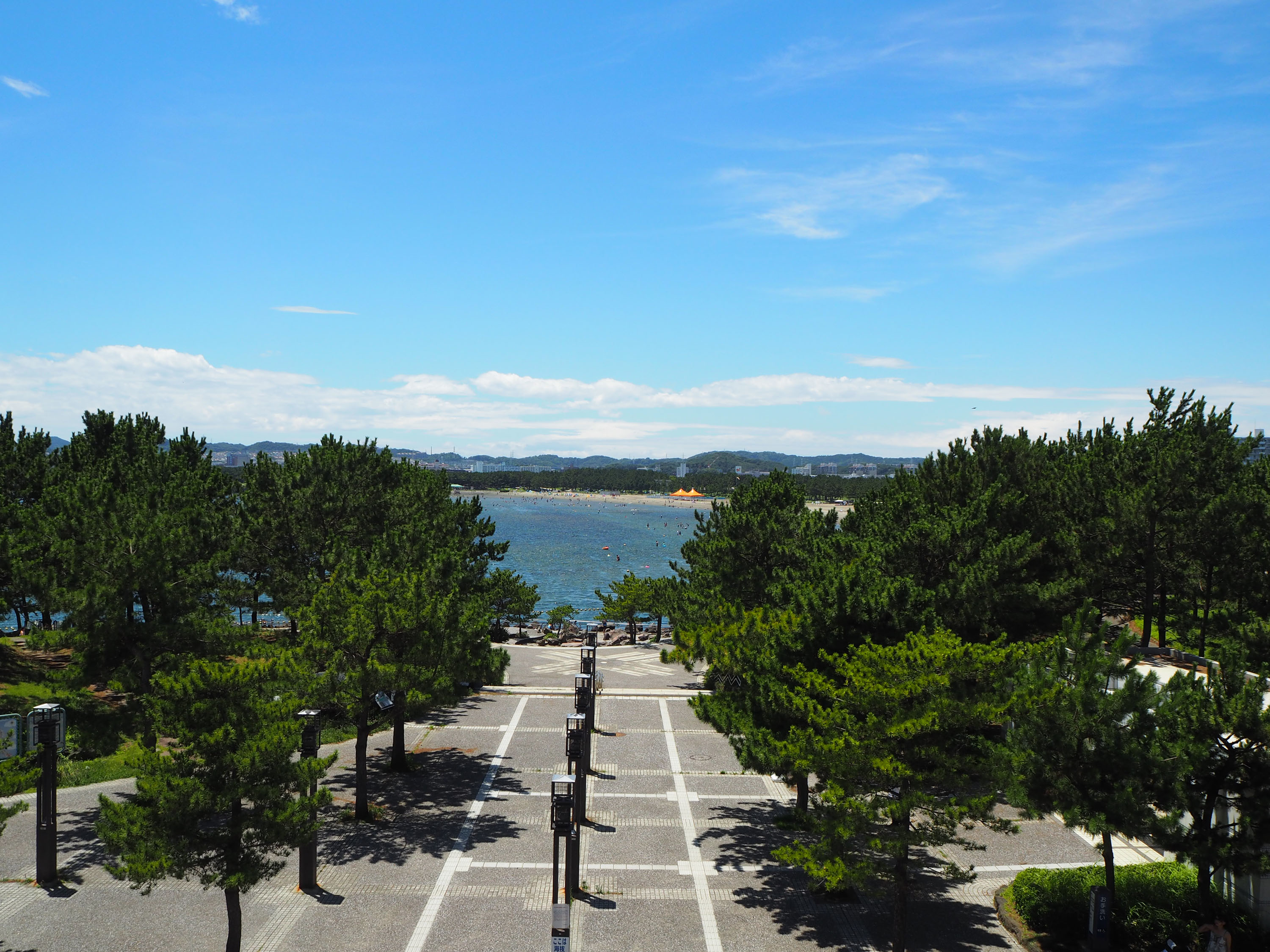 八景島駅ホームから海の公園を見る